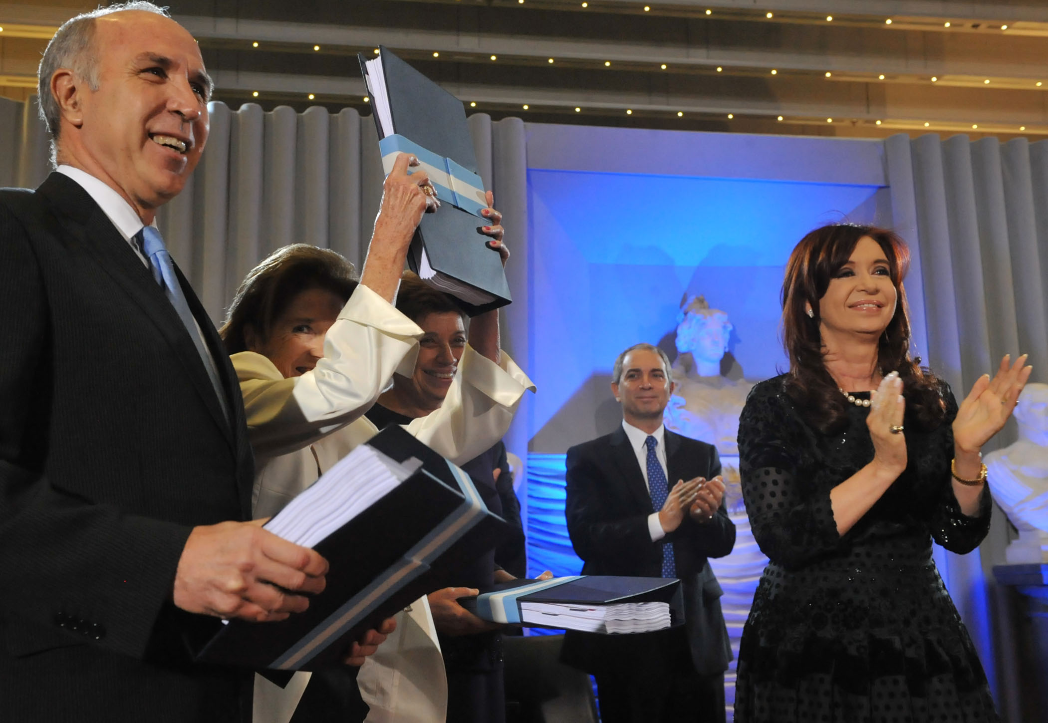 La Presidenta de la Nación recibió hoy el anteproyecto de reforma del Código Civil y Comercial de la Nación, al que consideró “un salto cualitativo”. En un acto en el Museo del Bicentenario de Casa de Gobierno, la jefa de Estado aseguró que el objetivo del nuevo código es “asegurar la libertad y la dignidad de las personas para elegir en el marco de las leyes su forma de vida”. Y remarcó que "sin sociedad y sin democracia, no hay derecho". Previamente, el presidente de la Corte Suprema de Justicia, Ricardo Lorenzetti, destacó que la reforma es “el trabajo de una generación”.